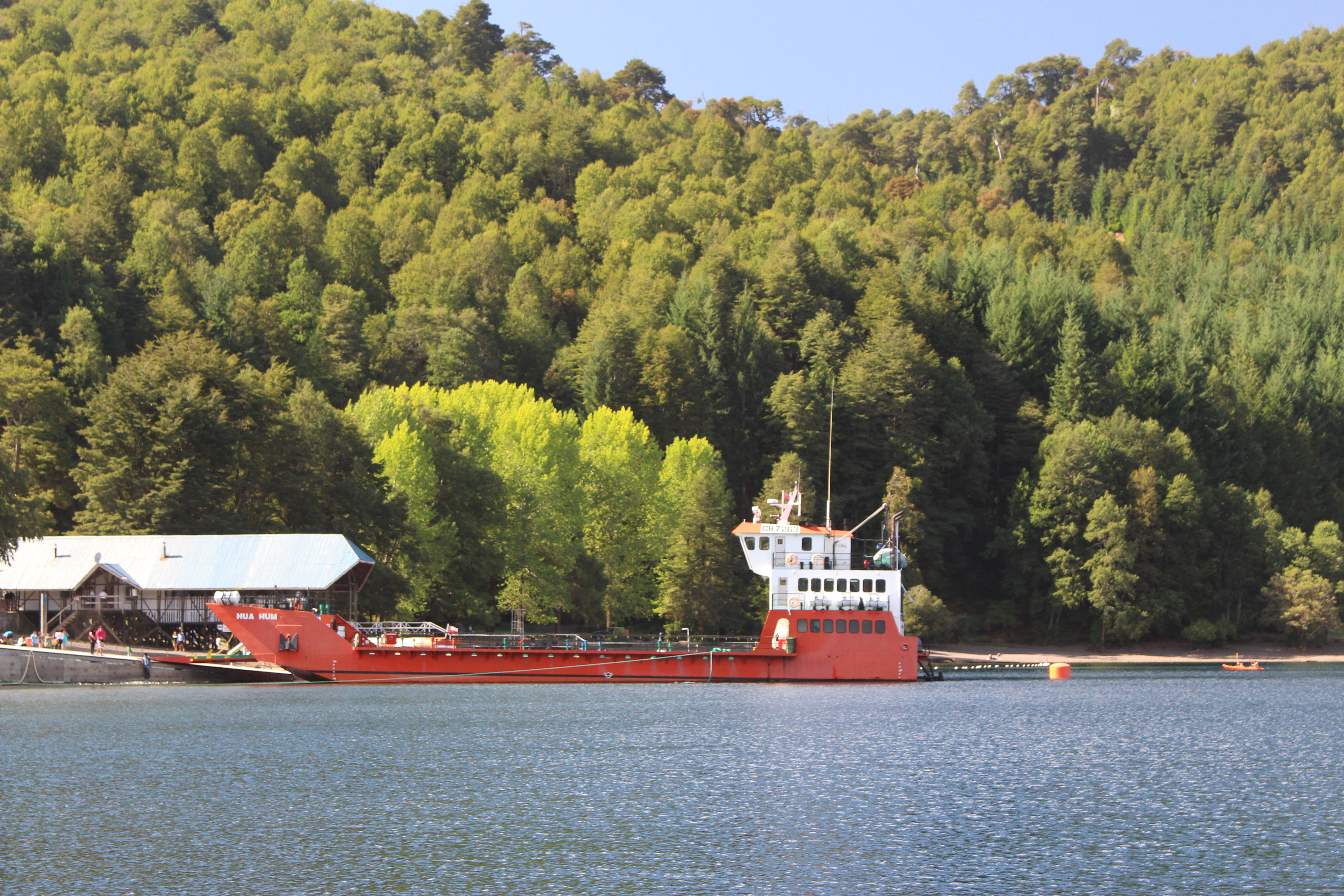 Transbordador Hua Hum, en Puerto Fuy, Lago Lago Pirihueico, región de Los Ríos, Chile en el año 2016